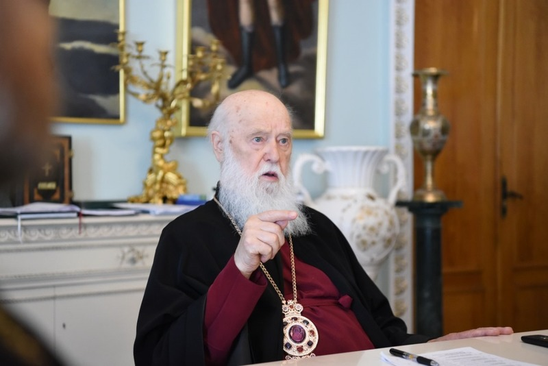 Патріарх Філарет провів збори настоятелів храмів м. Києва